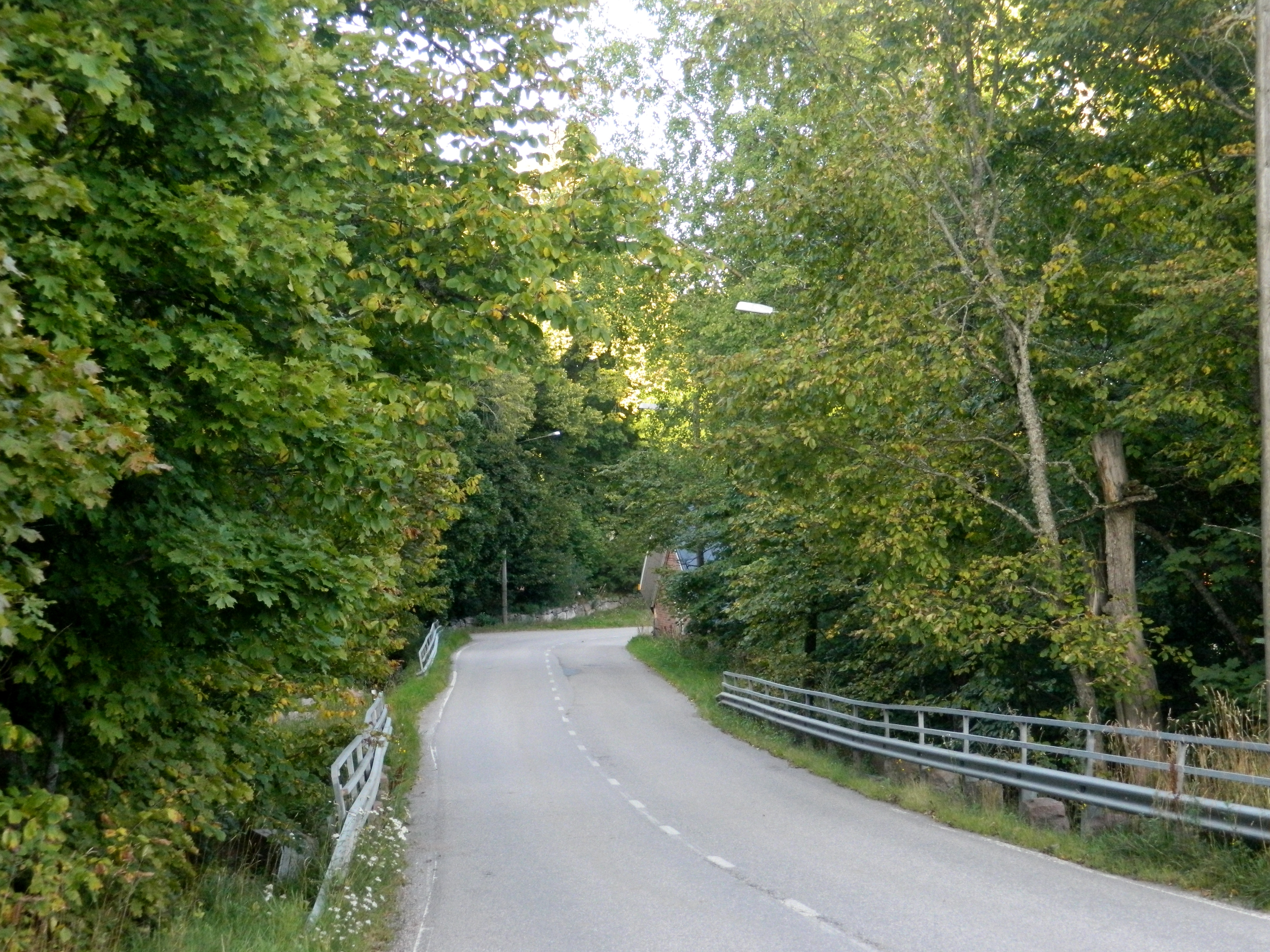 Maisema Espoonkartanon alueella Sågbron sillalla.